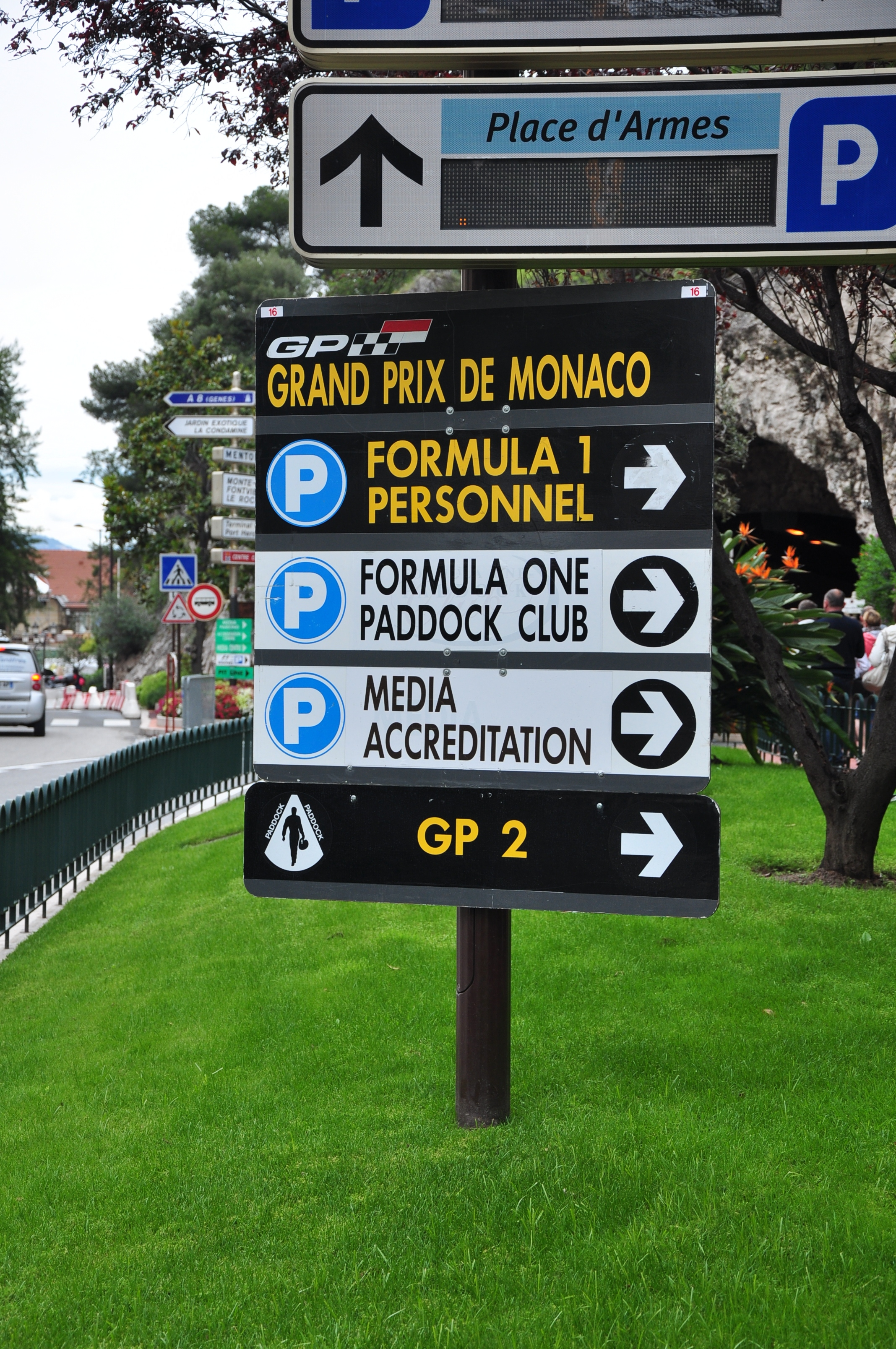 Drogowskaz. Grand Prix F1 w Monaco.